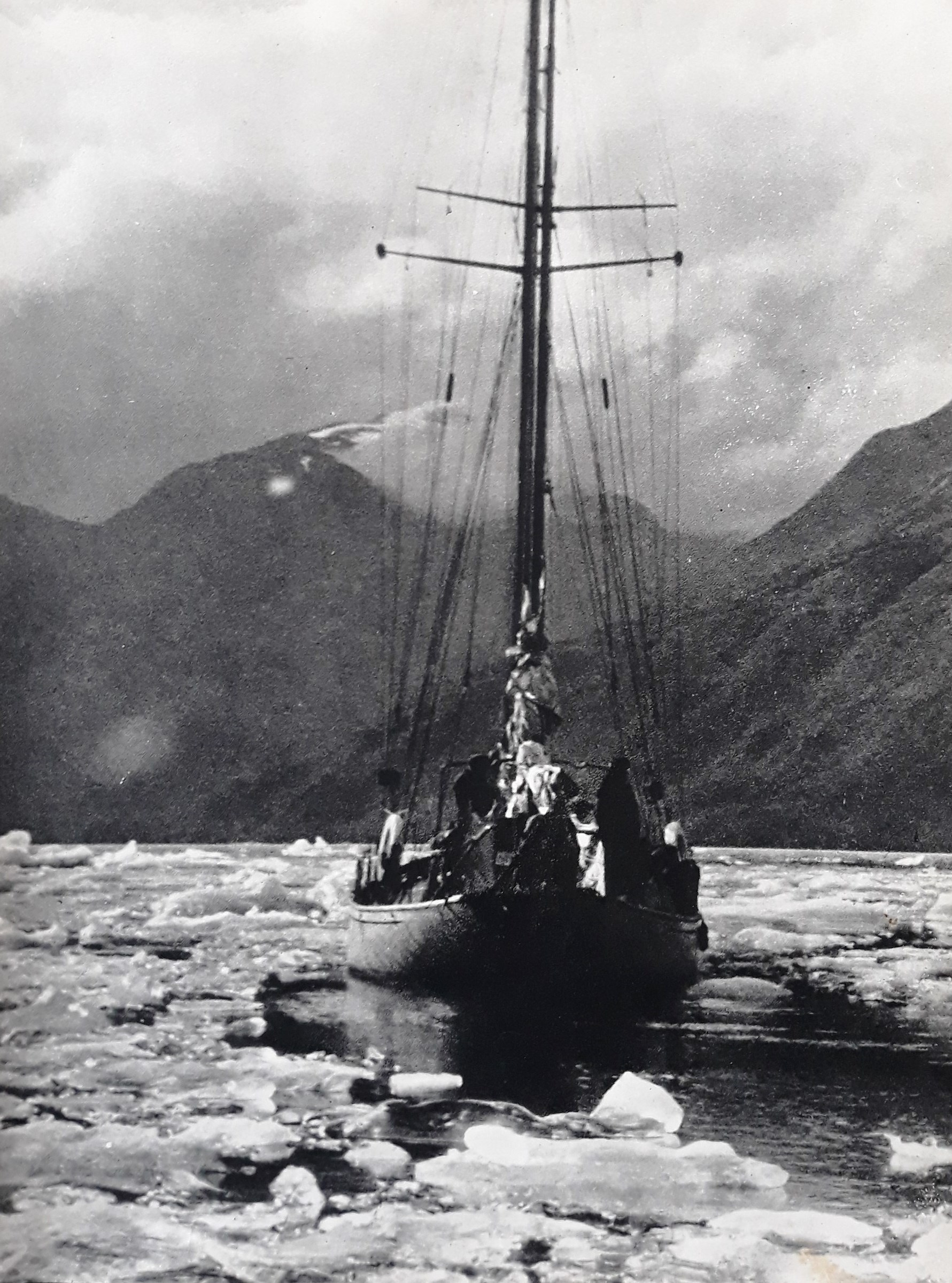 "Śmiały" w lodowej pułapce